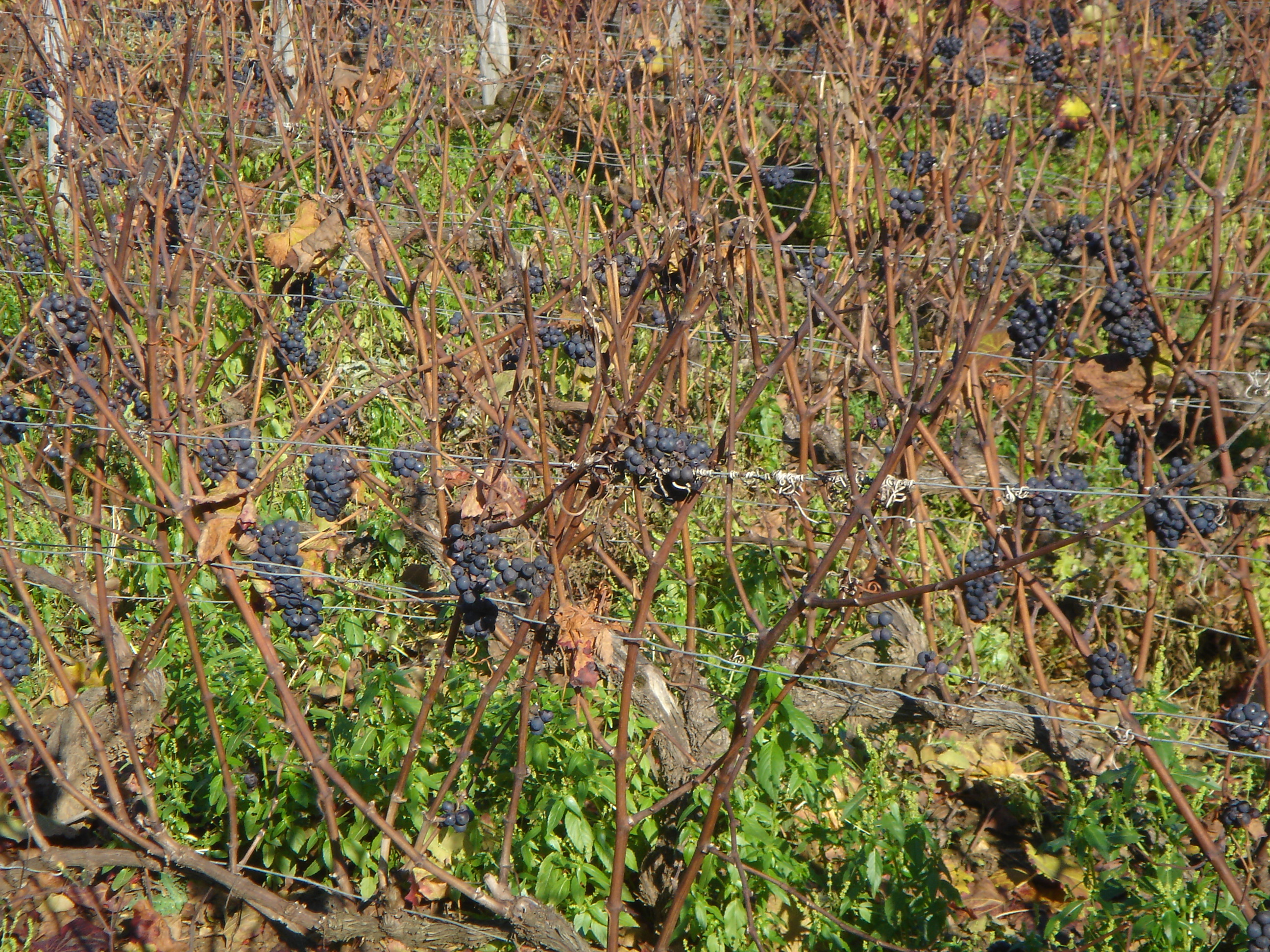 Burgundy wine Region, France November 14, 2008